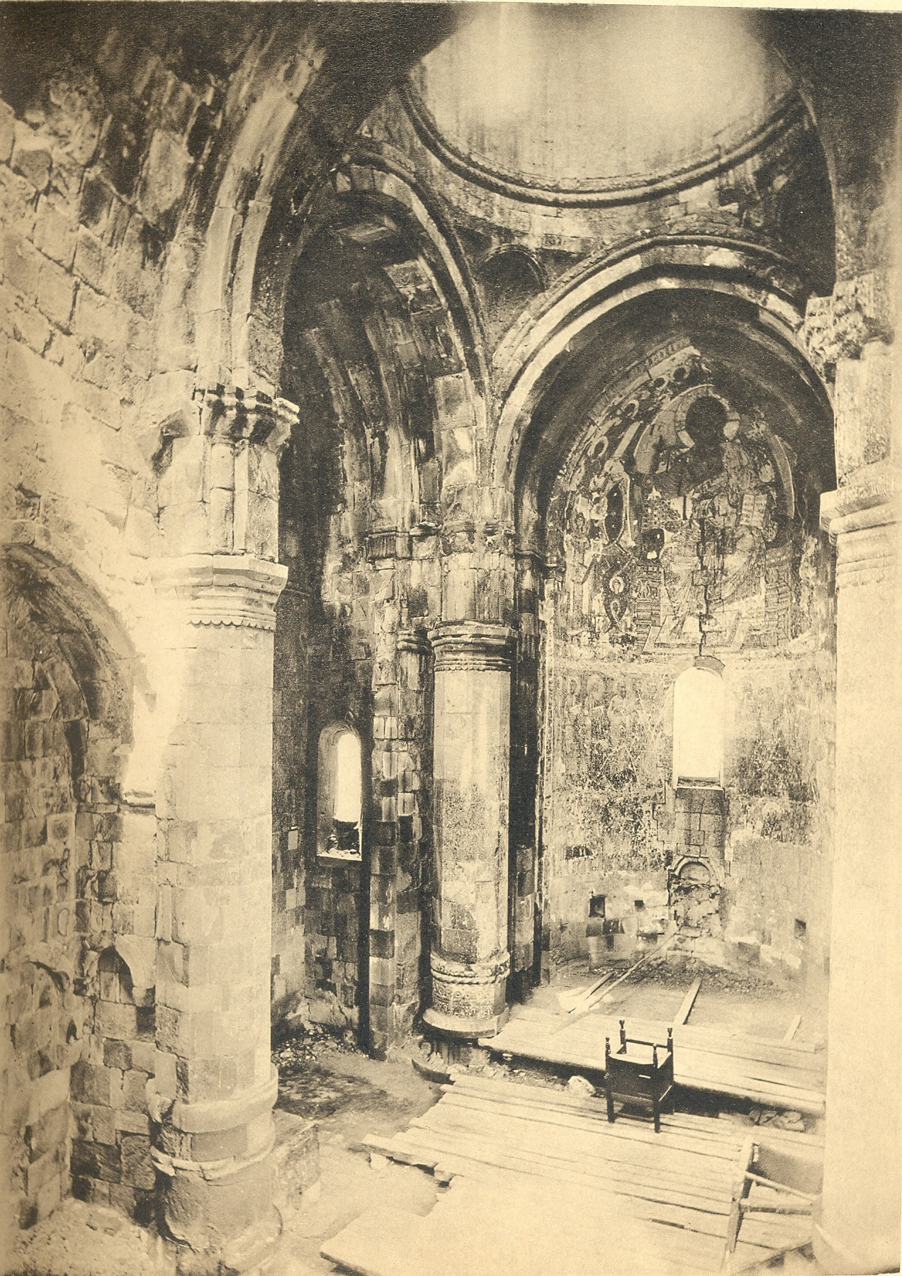 ტბეთი, 1888 - პავლინოვის ფოტო